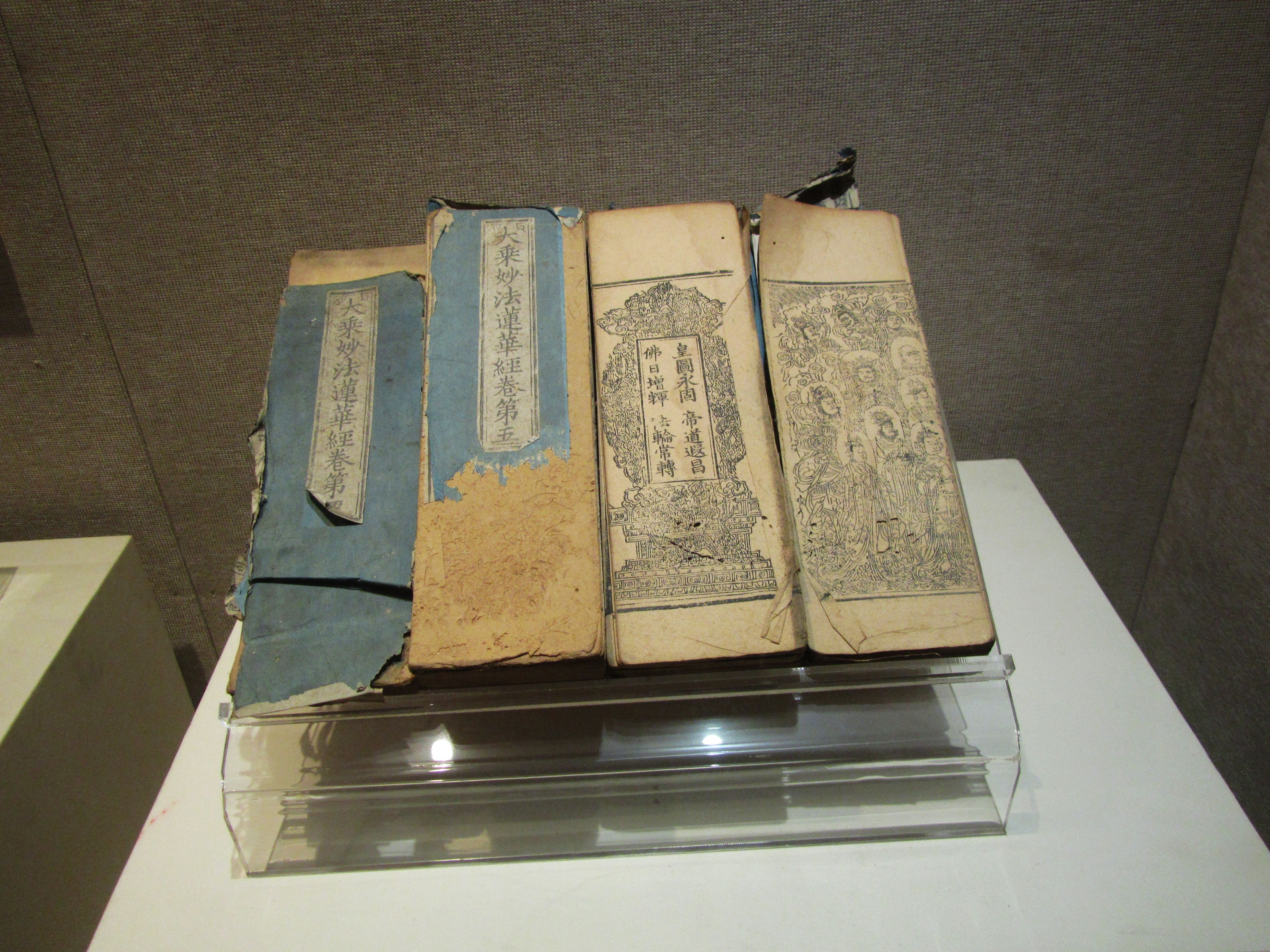 明代大港东霞寺佛像中出土妙法莲华经。